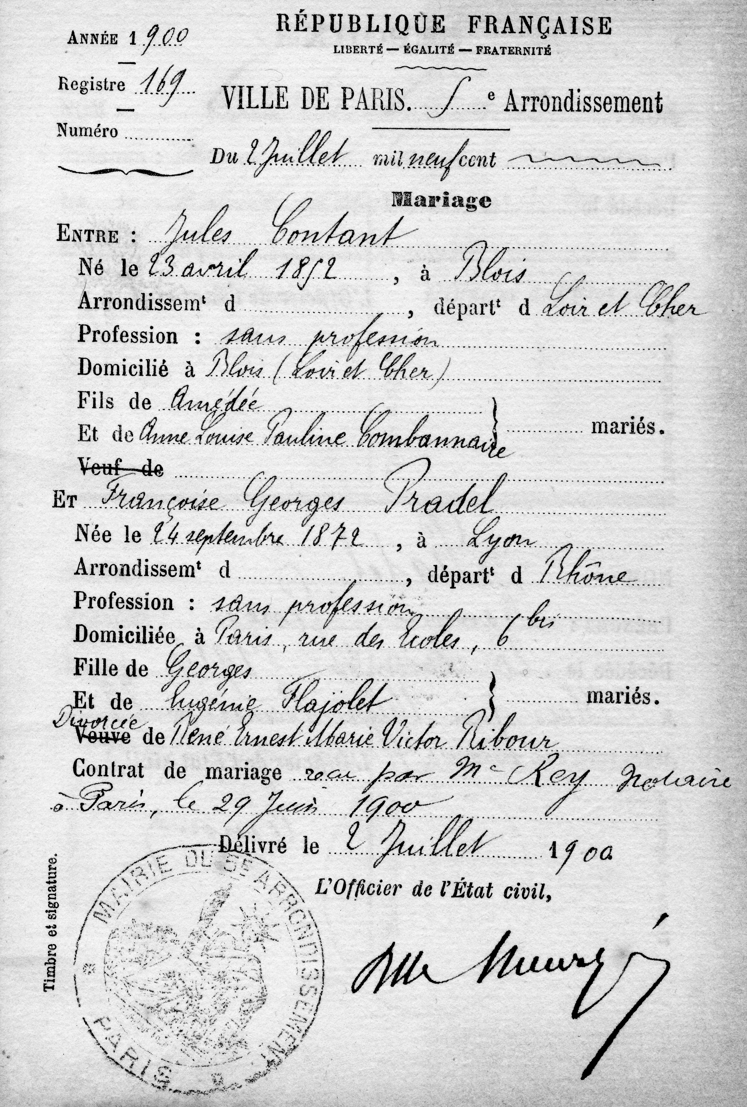 Scan du livret de famille du peintre blésois Jules Contant